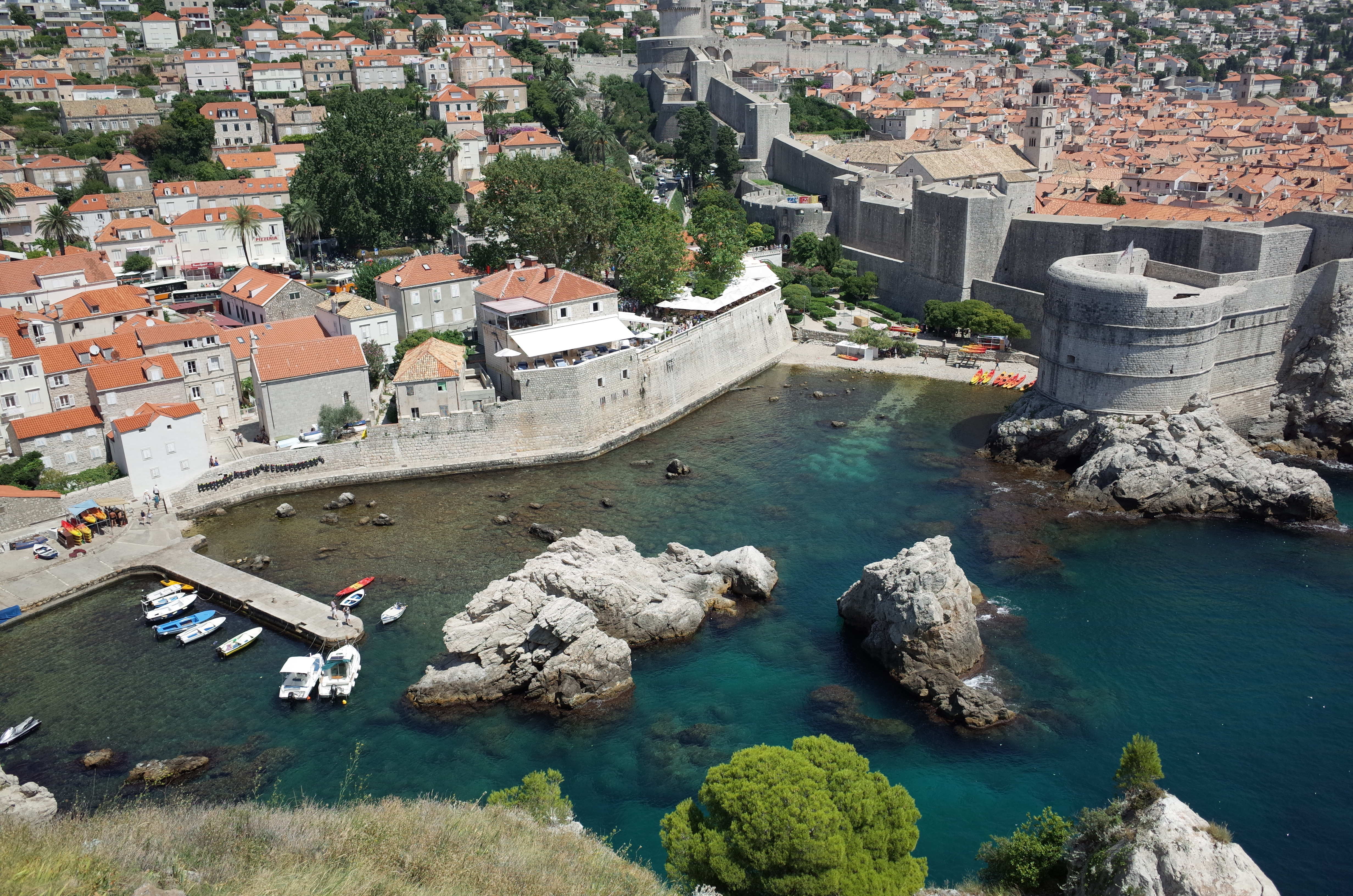 Stadtmauer von Dubrovnik von der Festung Lovrijenac aus gesehen